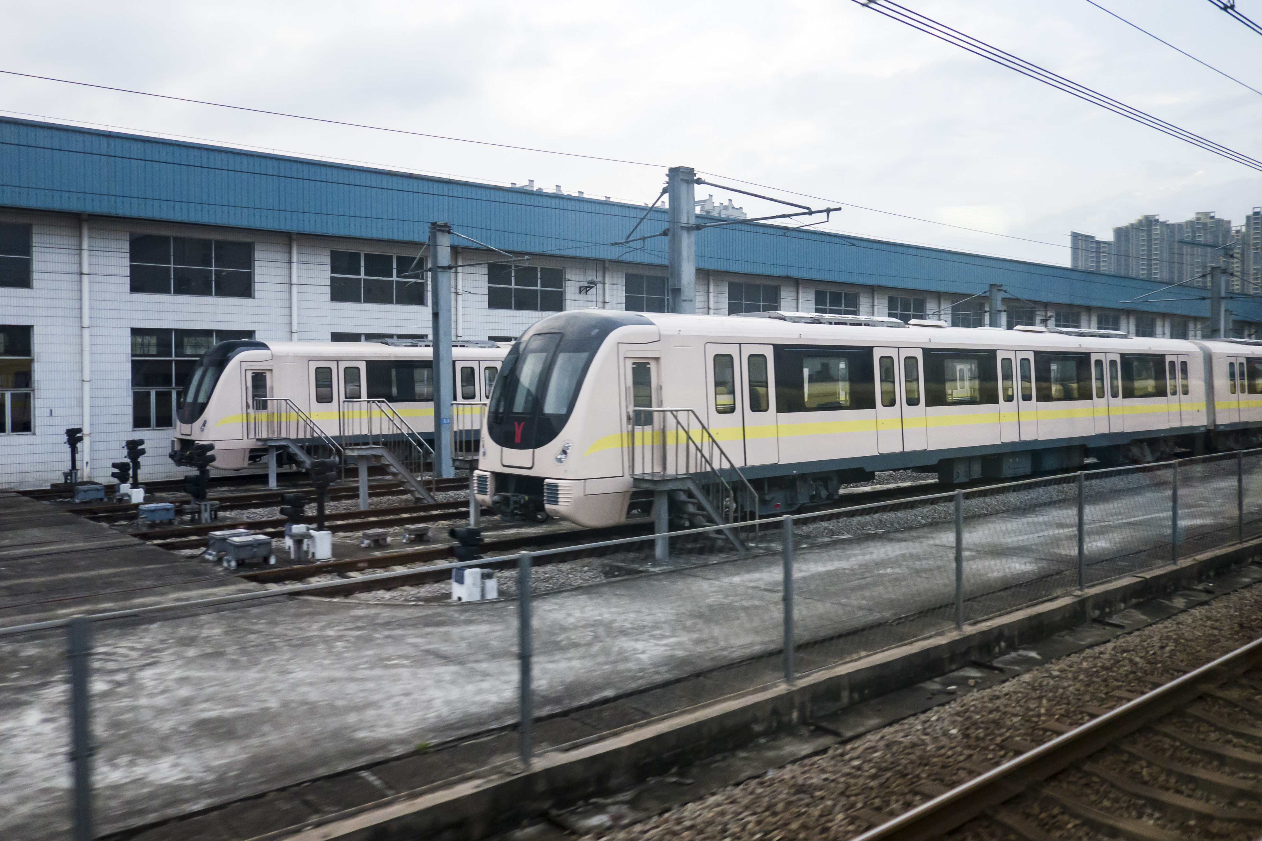 广州地铁8号线A6型列车在西朗车辆段